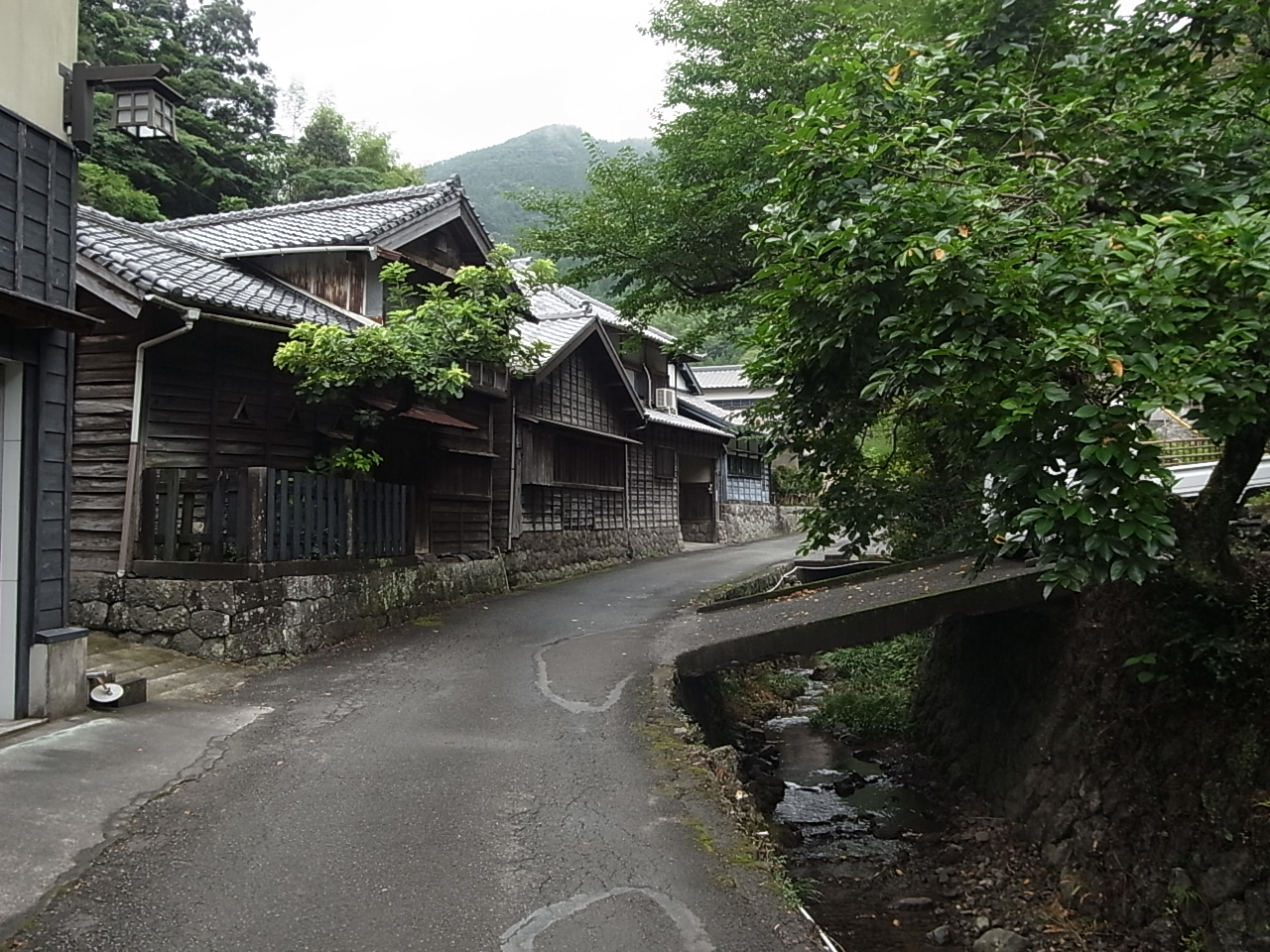 焼津市花沢地区（重要伝統的建造物群保存地区）